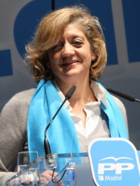 16 noviembre. Granados, Sardinero, Rosa Vindel e Ignacio Astarloa en Arganda del Rey